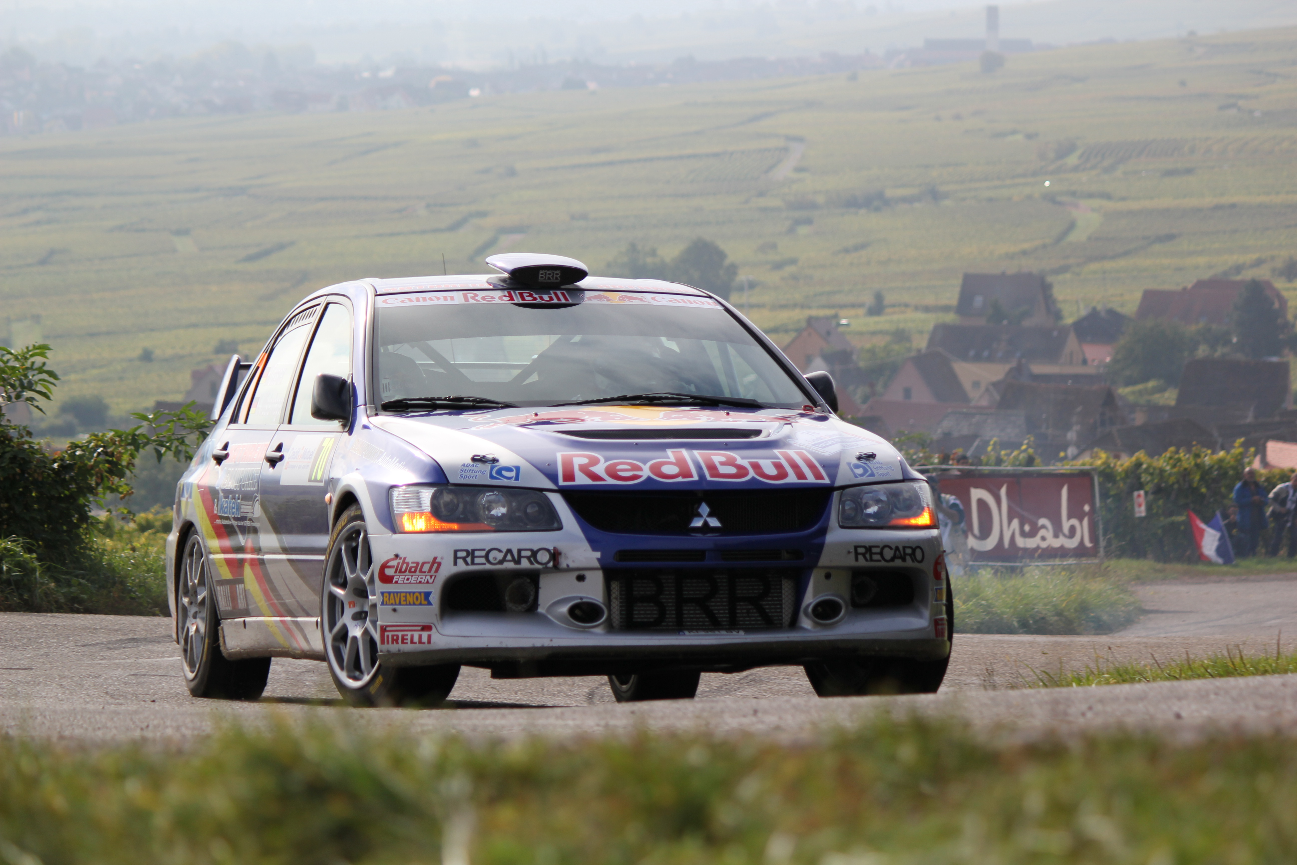 Mitsubishi Lancer Evolution IX présente lors du rallye d'Alsace en France au Championnat du monde des rallyes 2010.